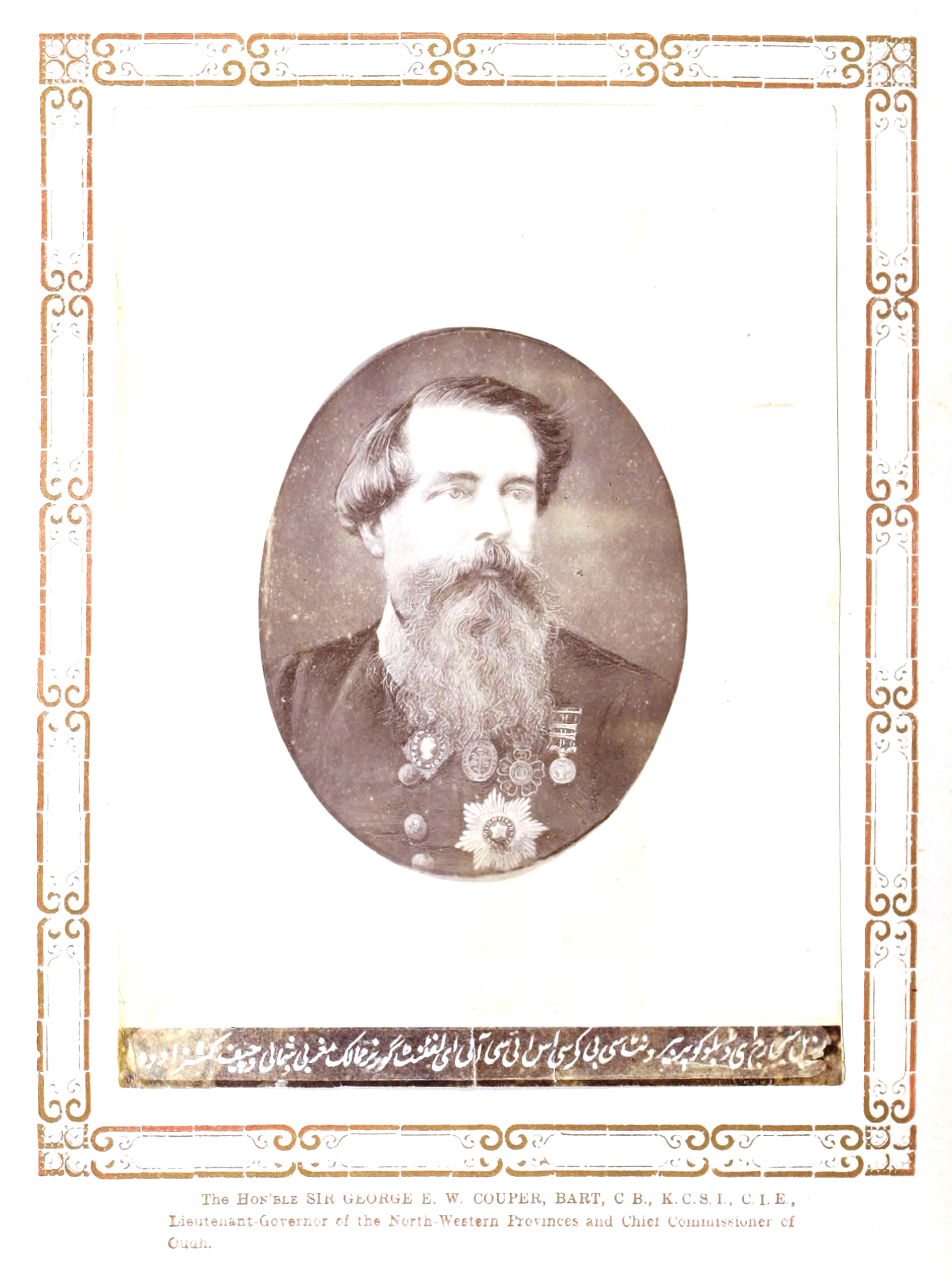 Sir George Ebenezer Wilson Couper, 2nd Baronet KCSI CB CIE (29 April 1824 – 5 March 1908)